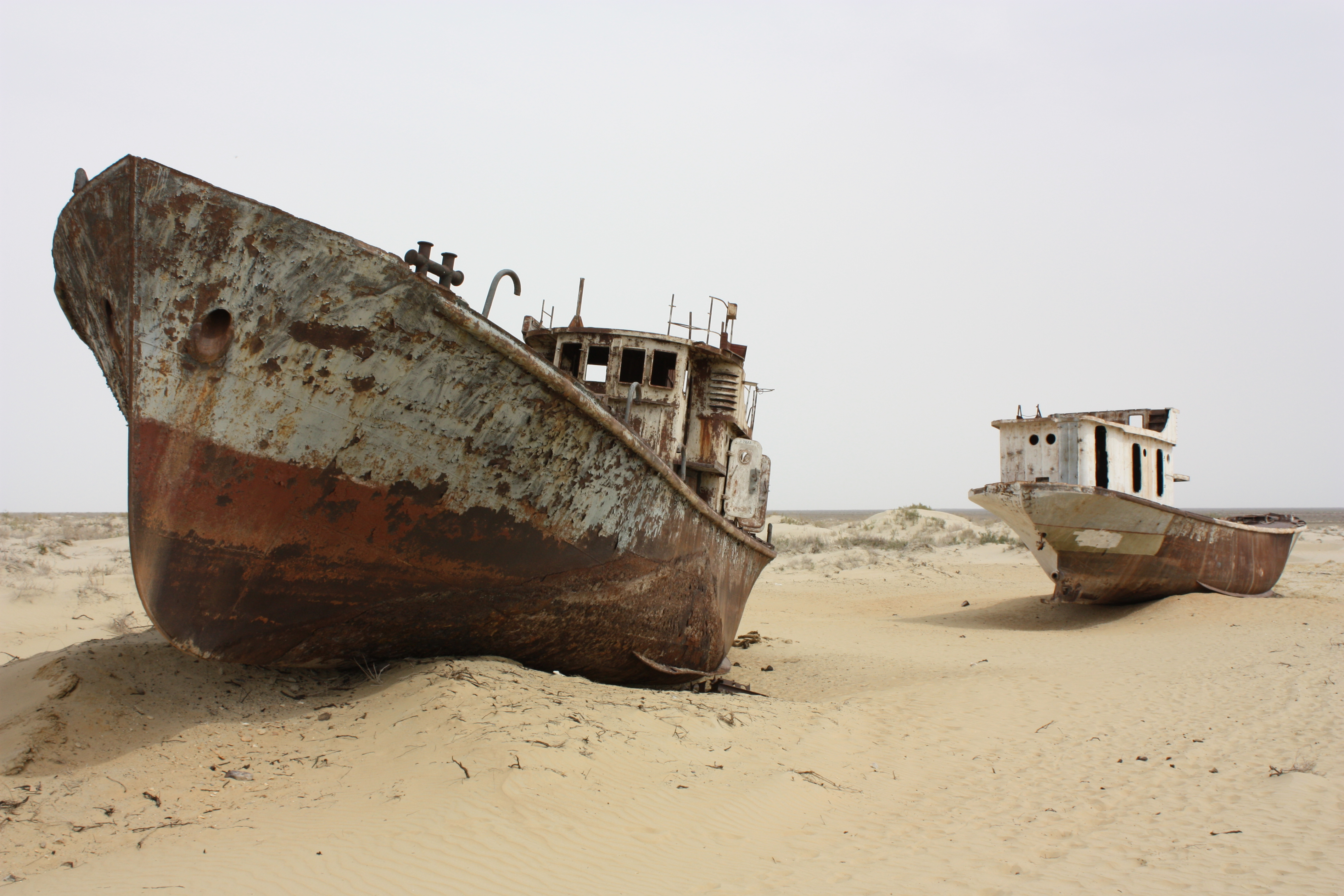 Moynaq